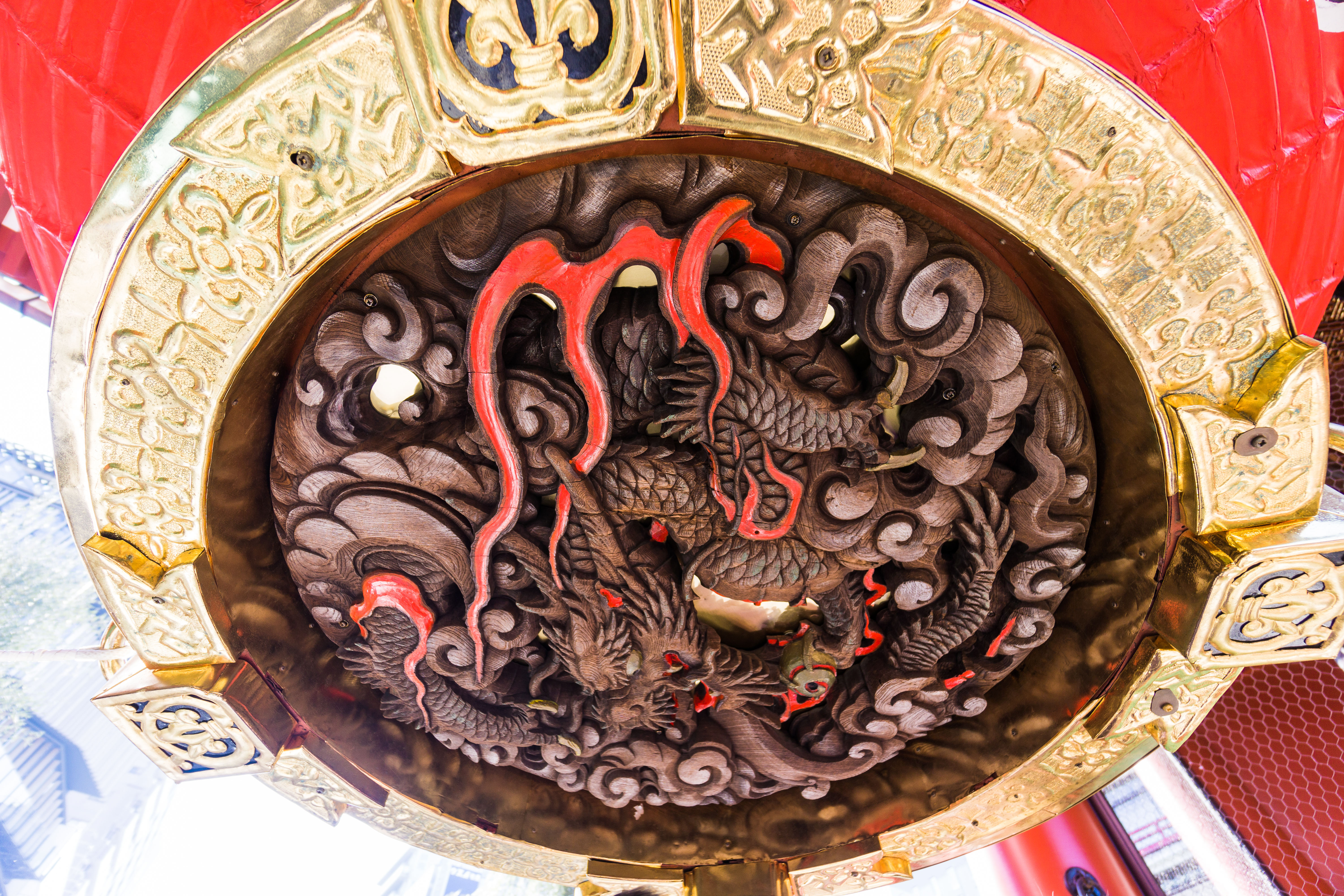 浅草寺 / Sensoji Temple